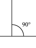 Pravý úhel